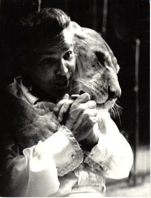 Abraçado com a Elza